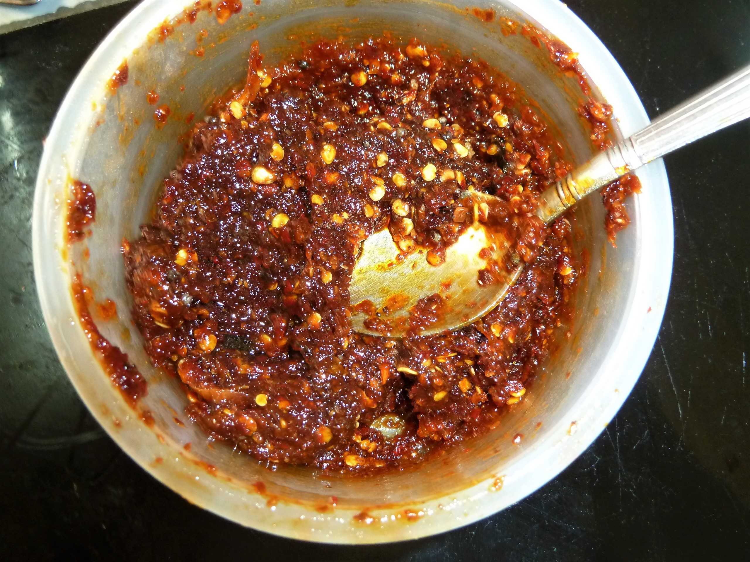 అల్లం పచ్చడి